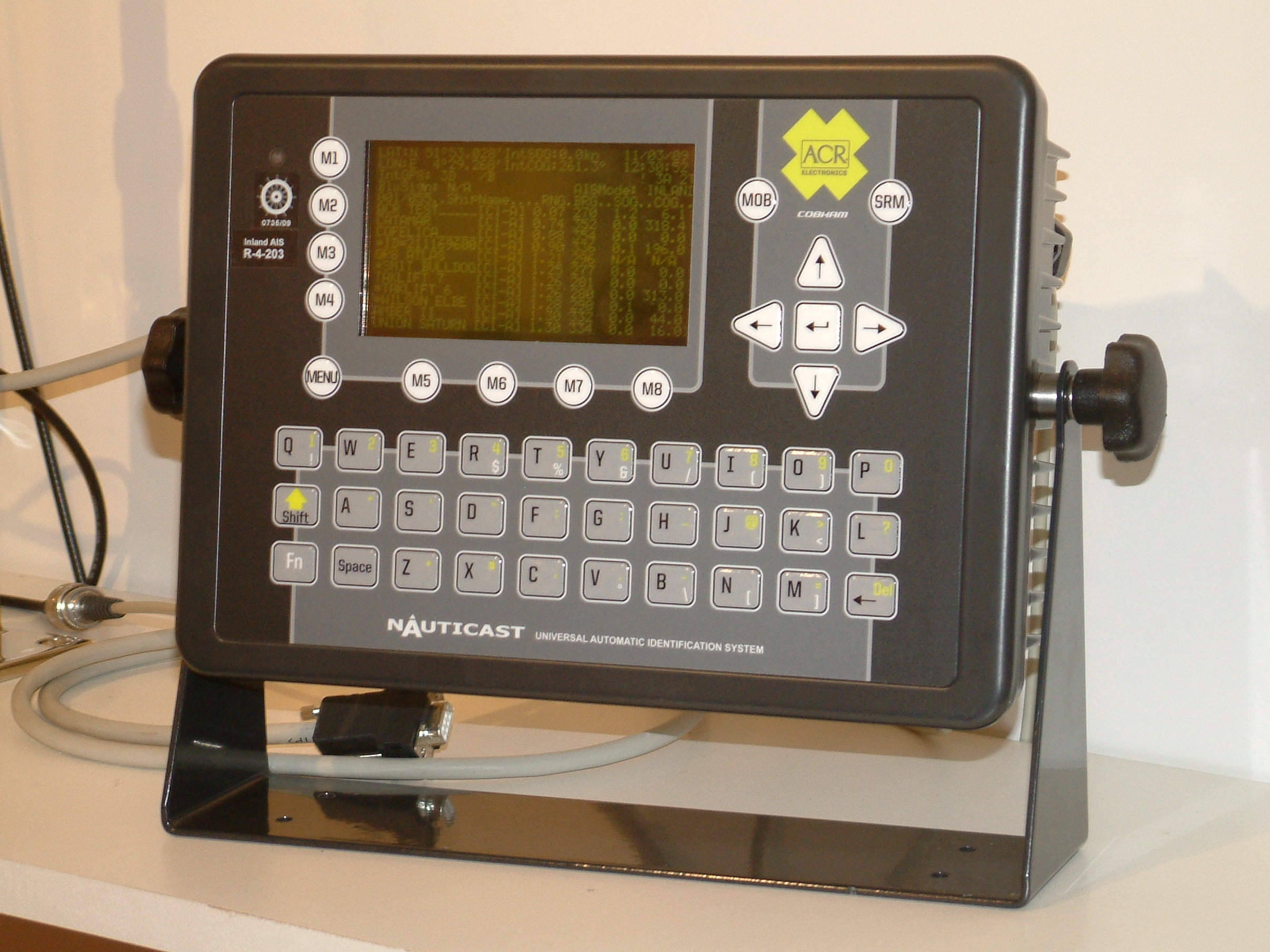 Nauticast Inland AIS Transponder make ACR type R-4-203 seen on Europort 2009